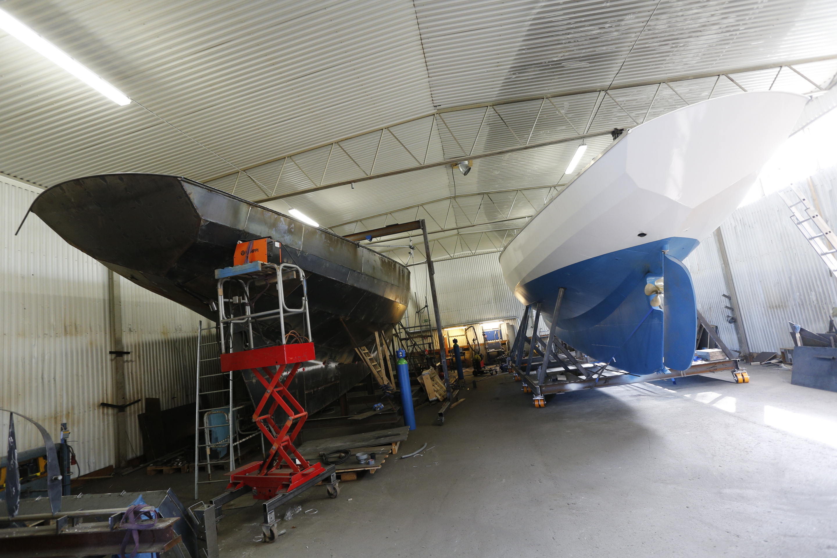 Bygge av segelfartyg